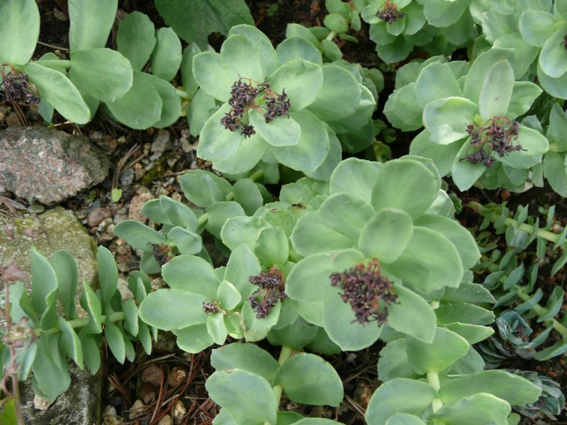 Botanischer Garten Erlangen, 2008